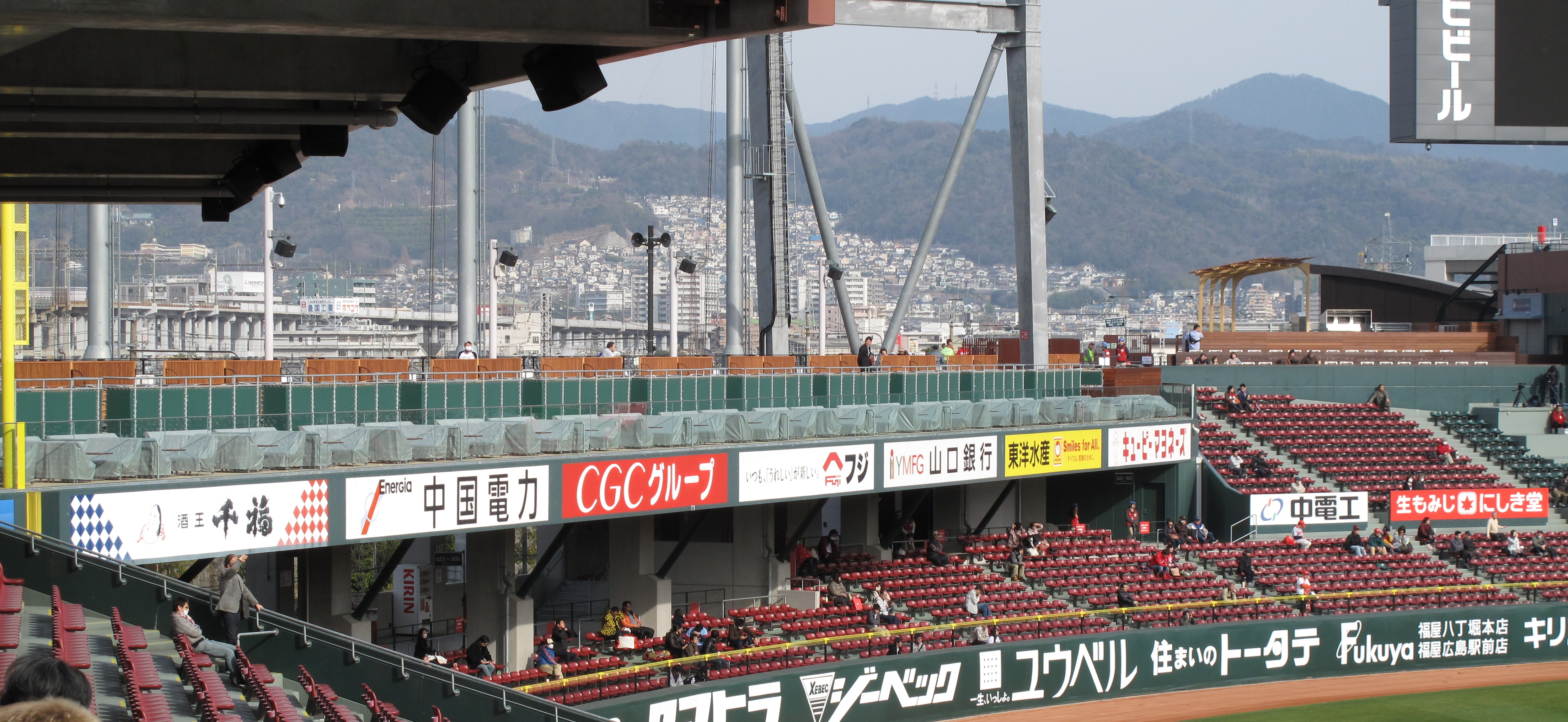 2013年のマツダスタジアム（広島市民球場）のレフトスタンド。開場から5年目を迎え、大幅な改修の手が入った。